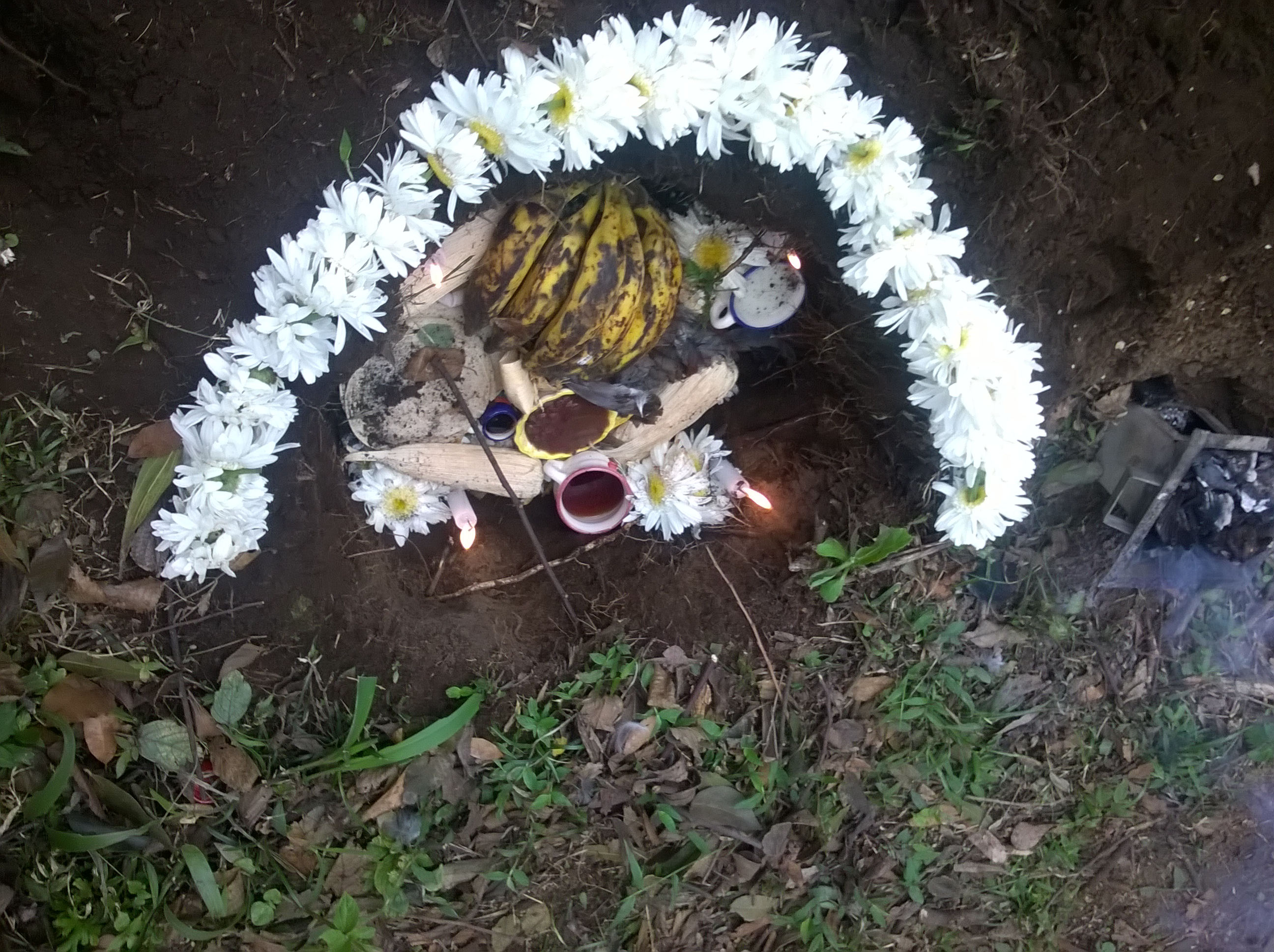 Xochitlallis es una ofrenda tradicional a la tierra de origen nahua